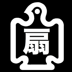 「寒雀の中に扇」紋（染抜）